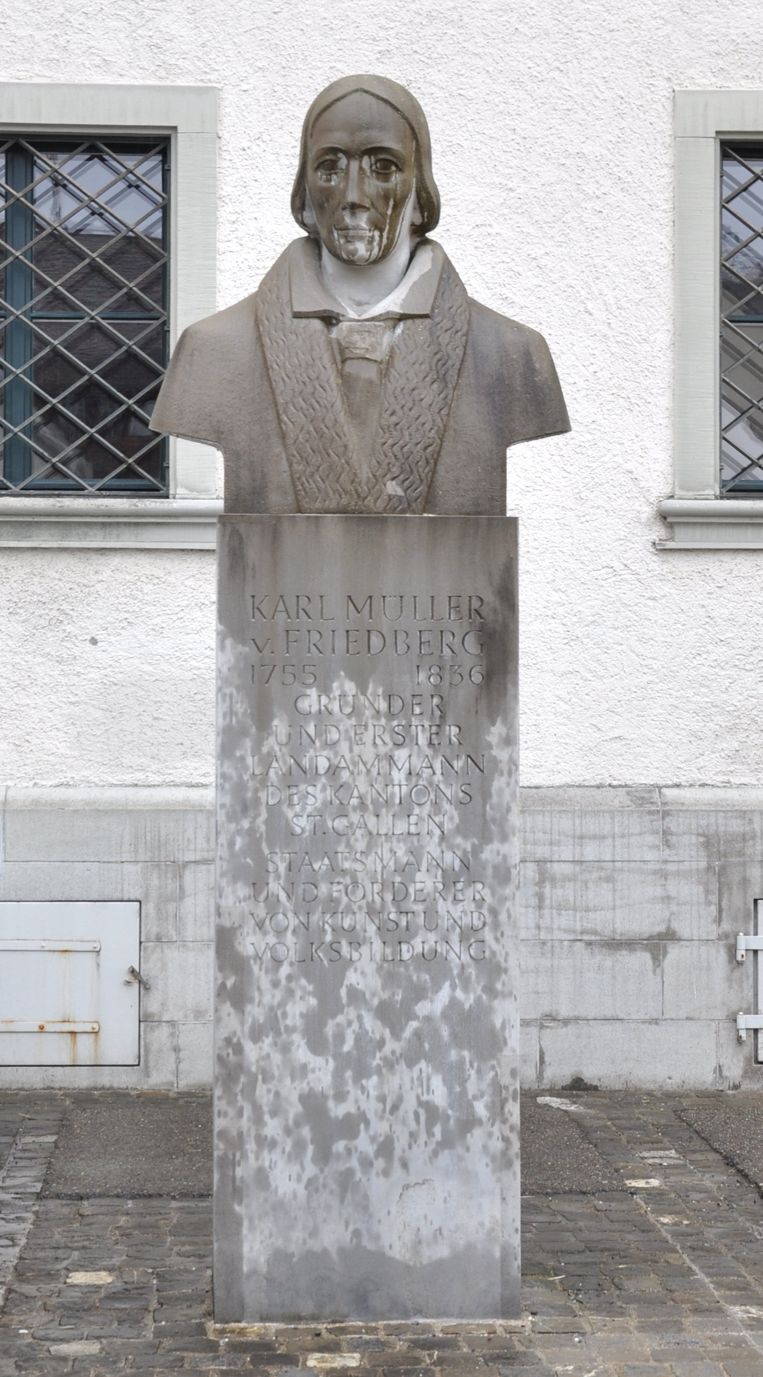 Büste Karl Müller von Friedberg in St. Gallen (Stiftsbezirk)